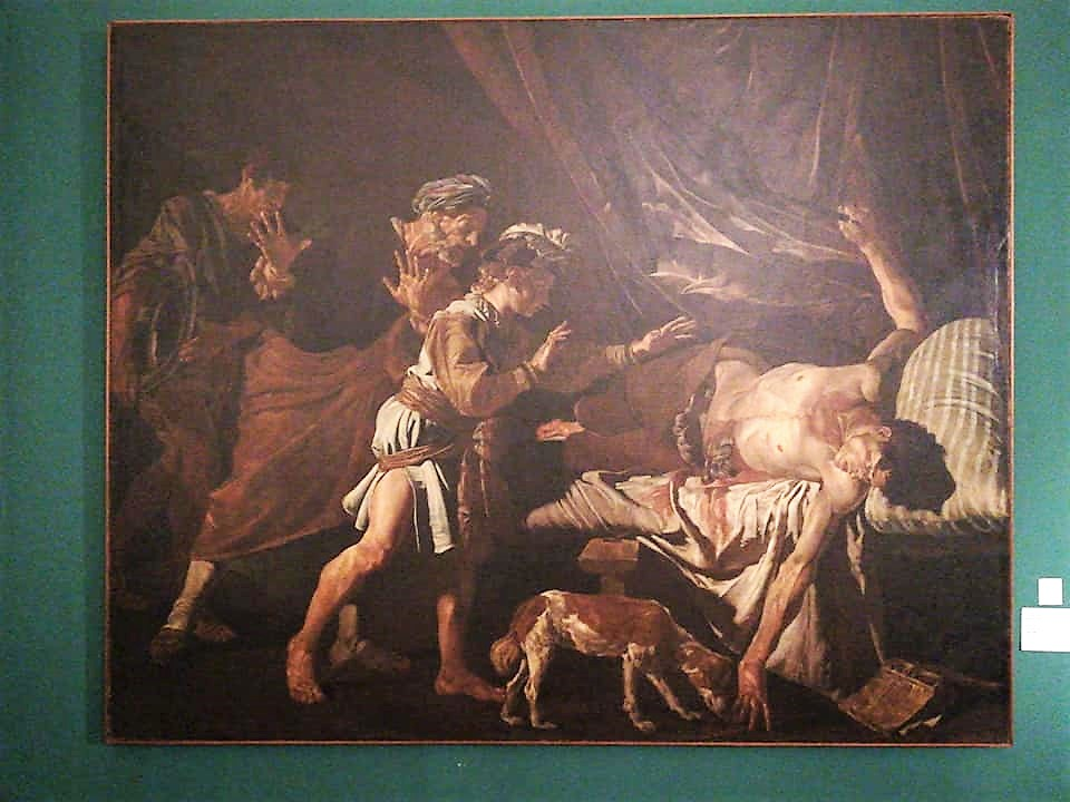 Morte di Catone opera di Matthias Stomer custodito nel Museo civico di Castello Ursino.